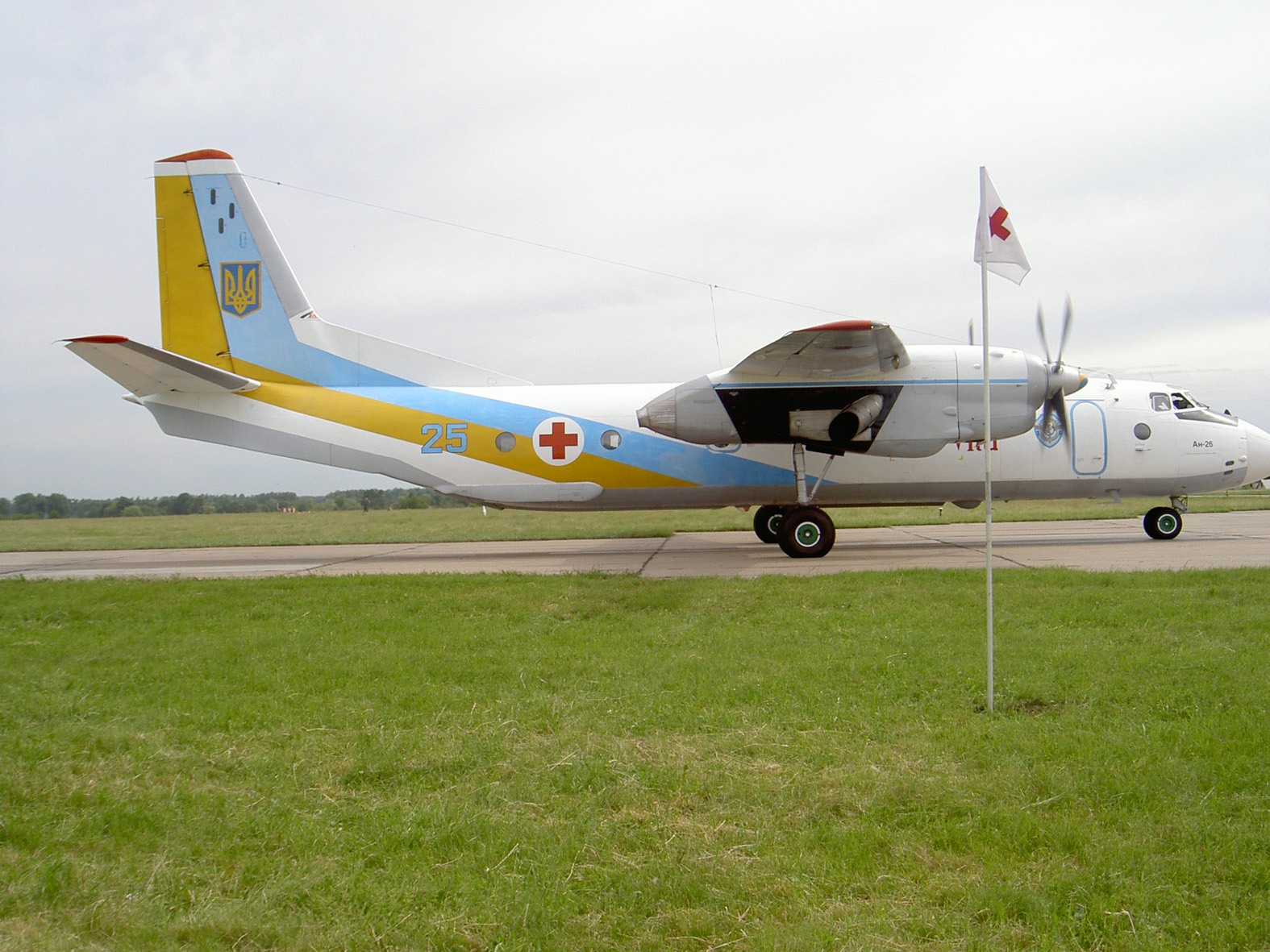 Реанімаційно-операційний літак Повітряних Сил ЗС України Ан-26 «Віта»